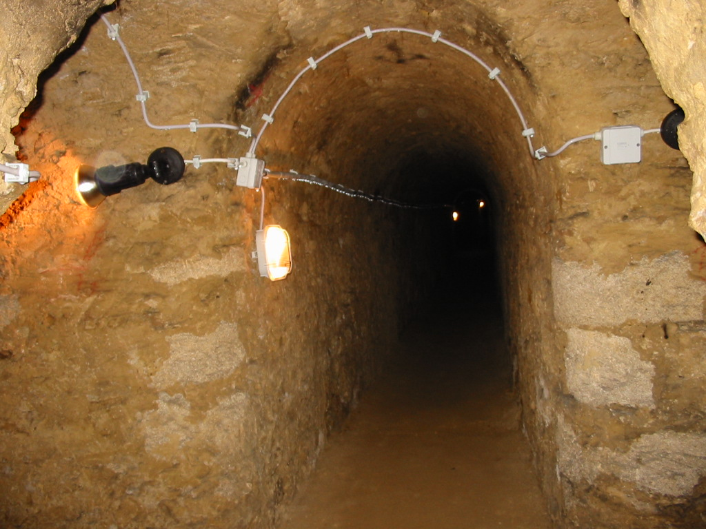 Gänge im Fort Josef, Mainz